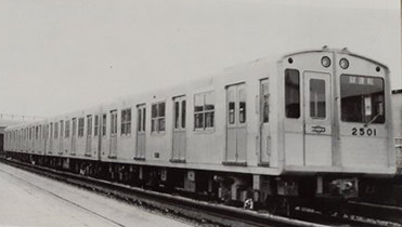 大阪市交通局初代20系電車